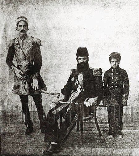 الوالي حسين قلي خان الثالث بن حيدر خان في صورة وهو يتوسط كل من ولديه (غلام رضا خان) و (علي رضا خان)